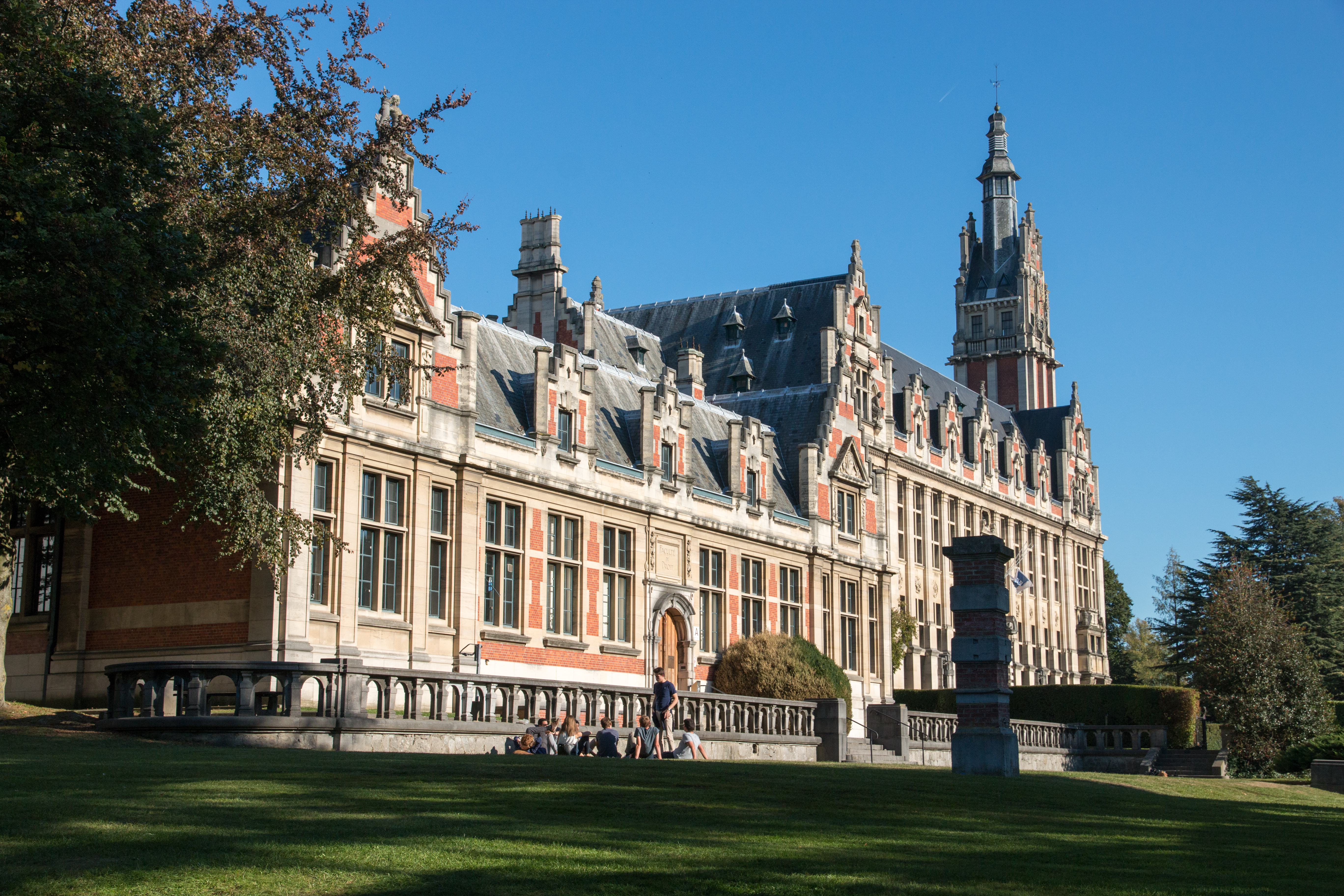 Université Libre de Bruxelles Franklin Rooseveltlaan Brussel This photo of immovable heritage has been taken in the Brussels Capital Region